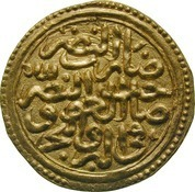 Султани (Алтун) — первая золотая монета Османской империи